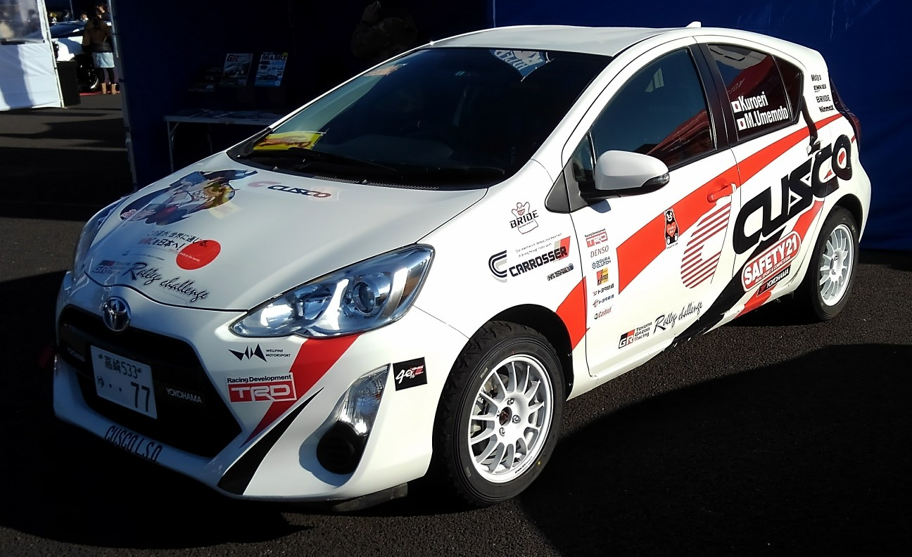 クスコ・ジュニアラリーチームにて、梅本まどかが搭乗したトヨタ・アクア